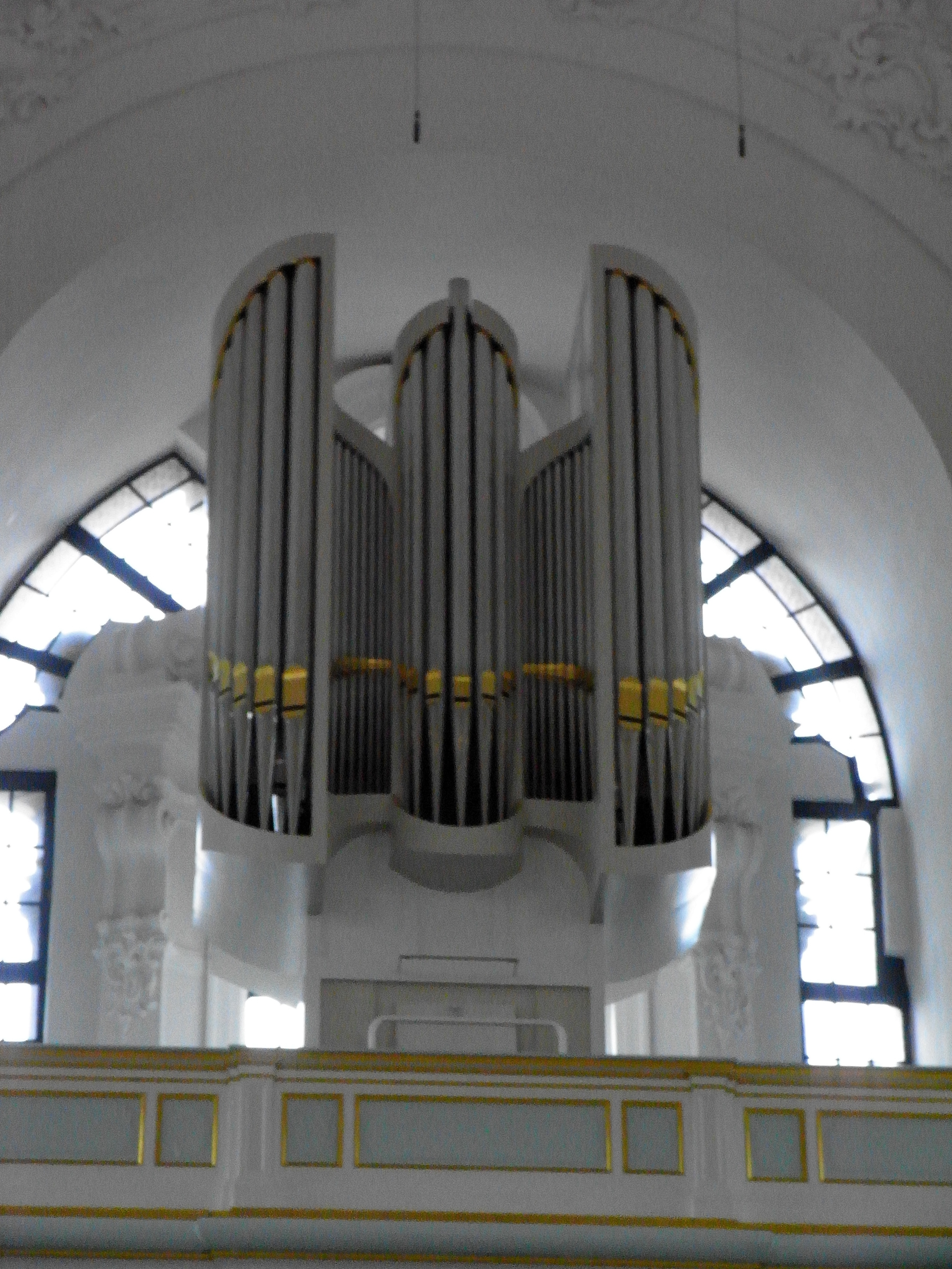 C.P.E.-Bach-Orgel in Sankt Michaelis, Hamburg